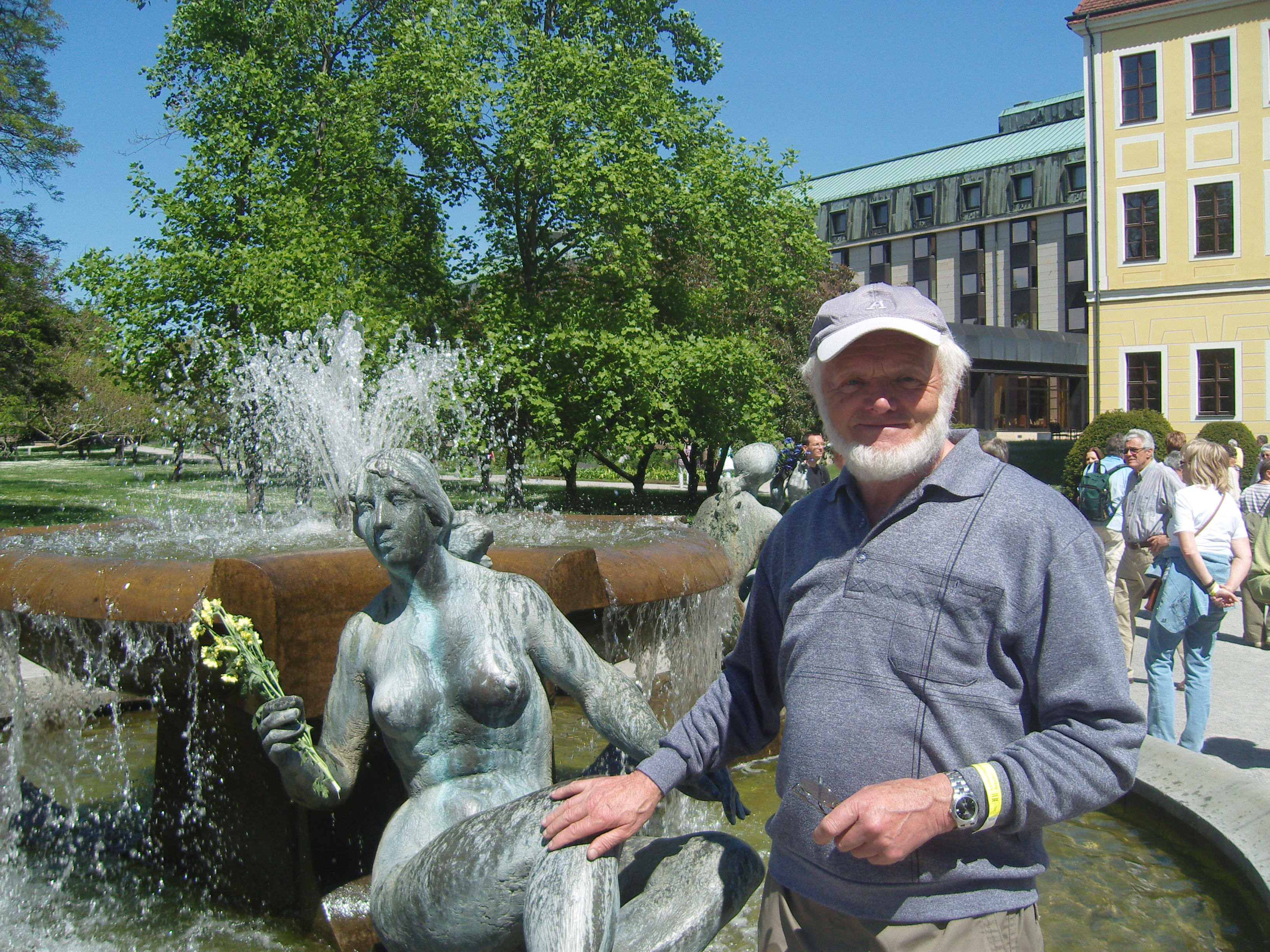 Vinzenz Wanitschke vor dem von ihm geschaffenen Brunnen "Drei Grazien" am Brunnentag in Dresden